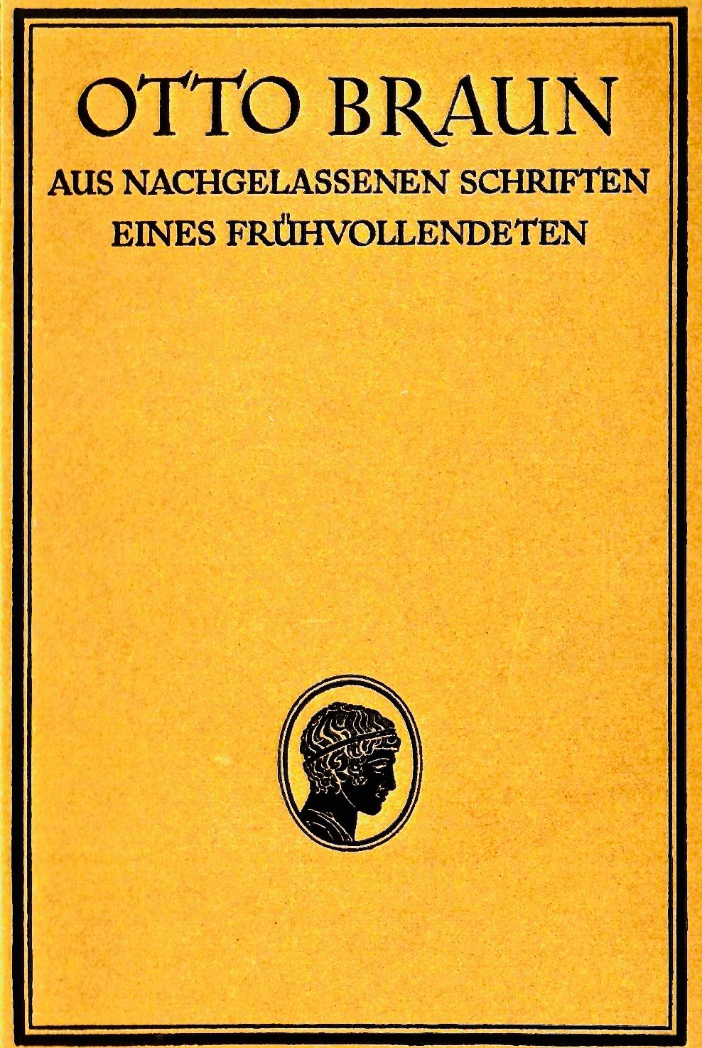 Julie Braun-Vogelstein (Hrsg.): Otto Braun. Aus nachgelassenen Schriften eines Frühvollendeten, Frontdeckel, 1921